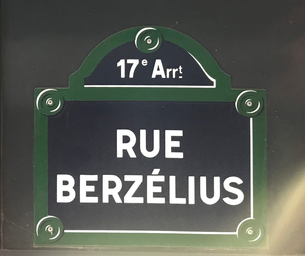 Image de Paris, septembre 2018.